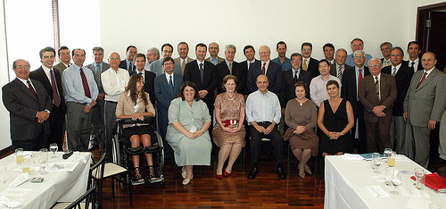 José Serra posa com membros de sua equipe de governo municipal, durante sua gestão como prefeito de São Paulo entre 2005 e 2006